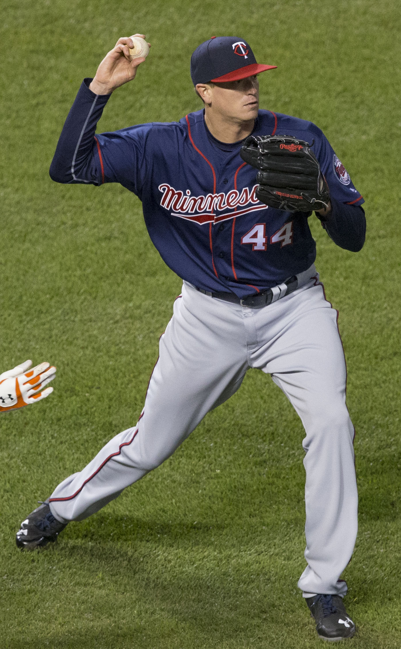 Kyle Gibson